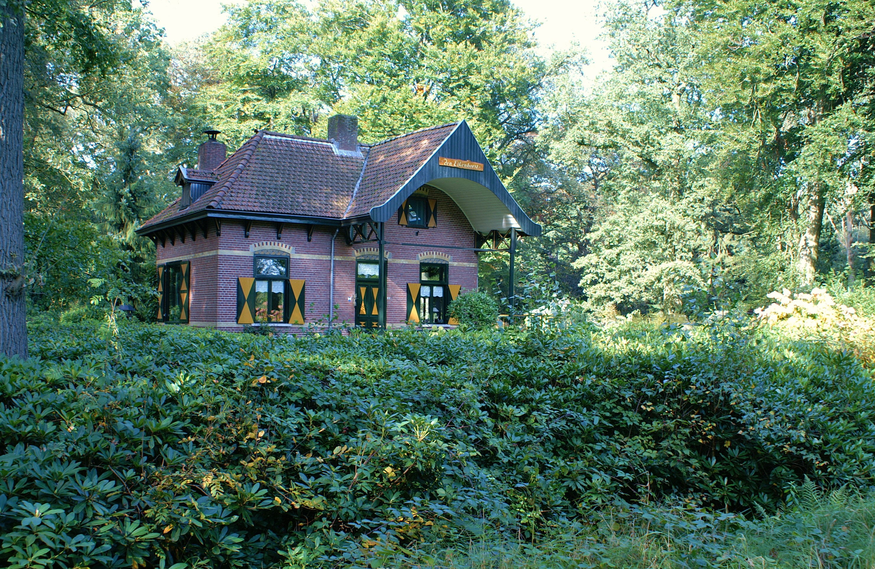 Portierswoning van landgoed Eikenhorst te Esch.